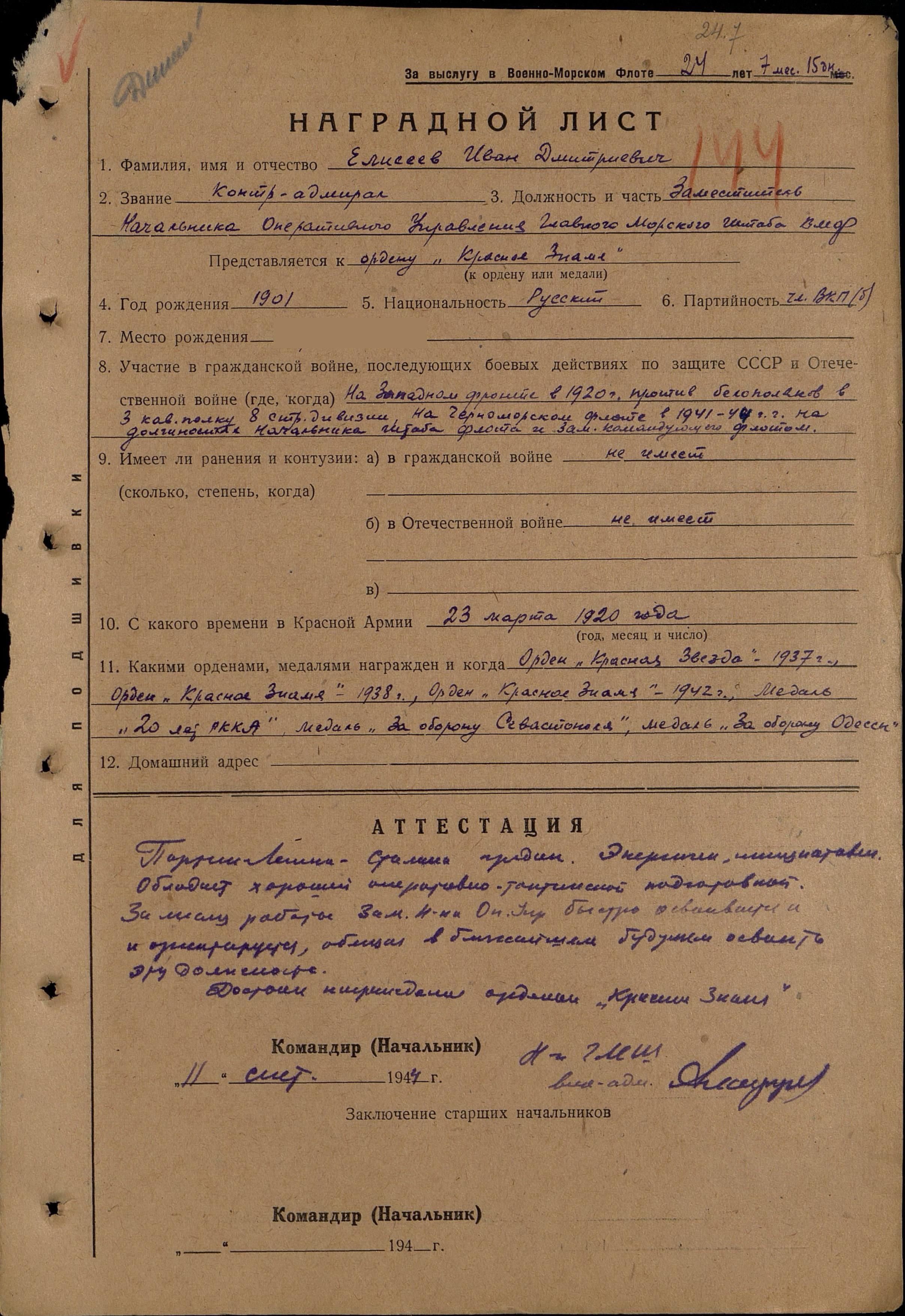 Официальный документ государственных органов